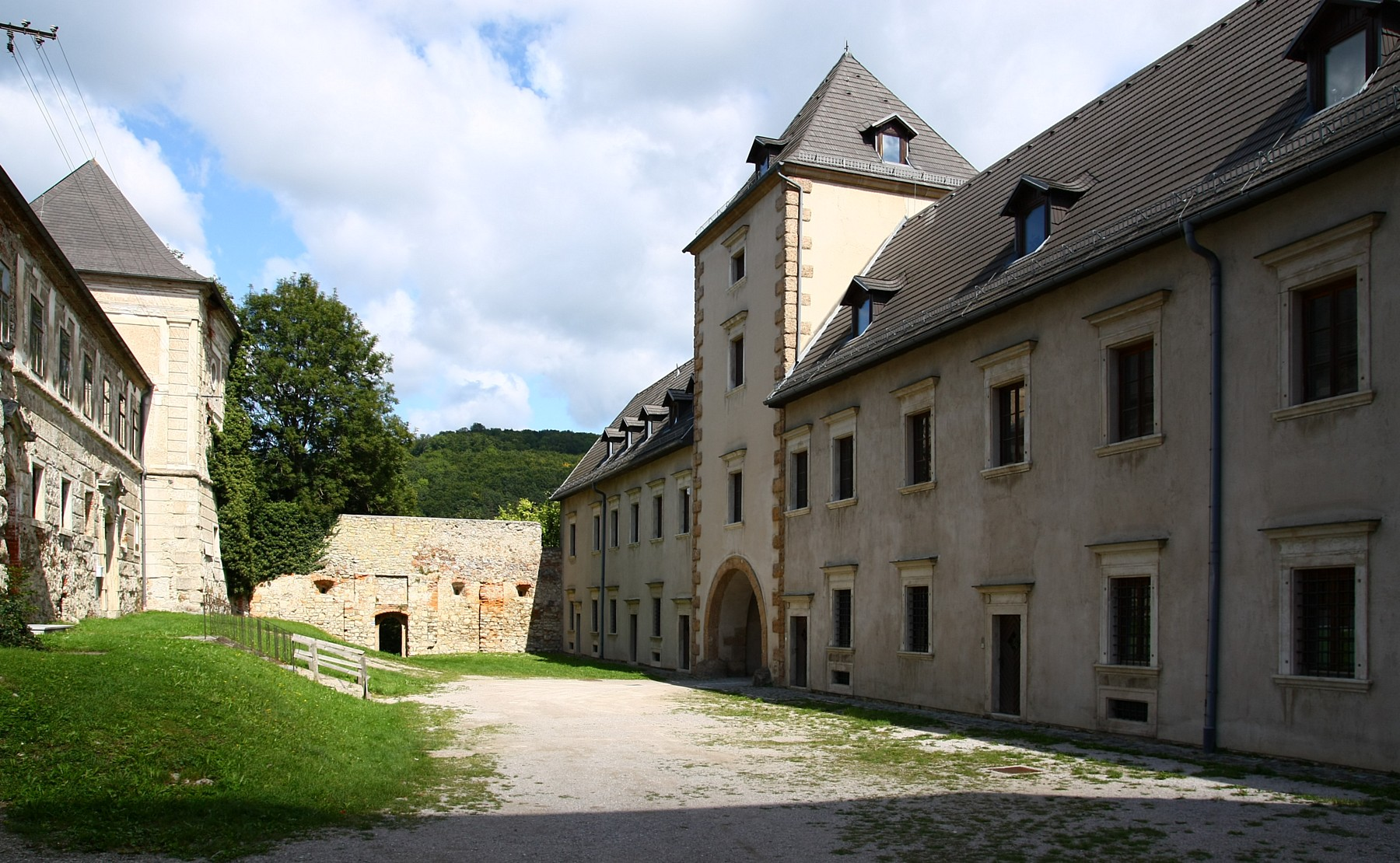 Der Ostbau der Burganlage der Burg Neuhaus (rechts) und der Westbau mit NW-Turm (links), Neuhaus (Gemeinde Weissenbach an der Triesting), Wienerwald, Österreich